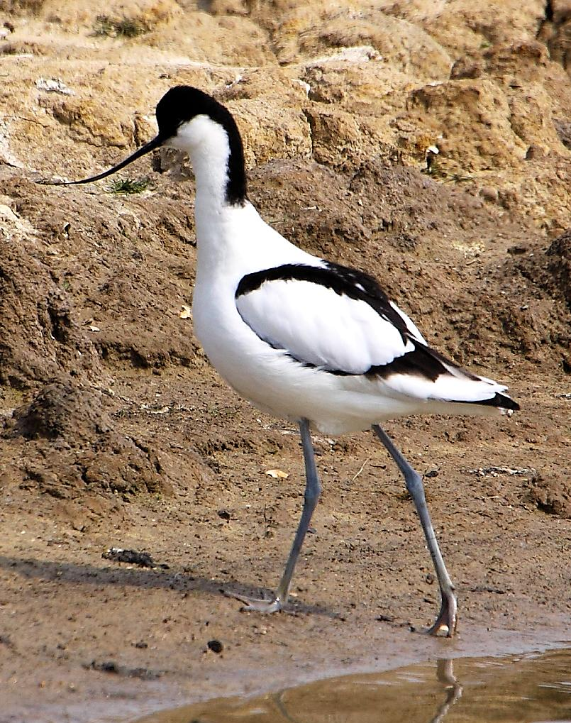 Avocet - Minsmere